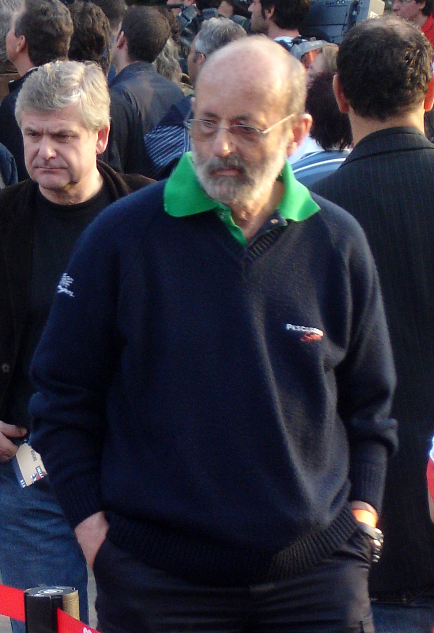 Henri Pescarolo, expilot de Fórmula 1 (durant l'acte de commemoració del "Circuit de Montjuïc").